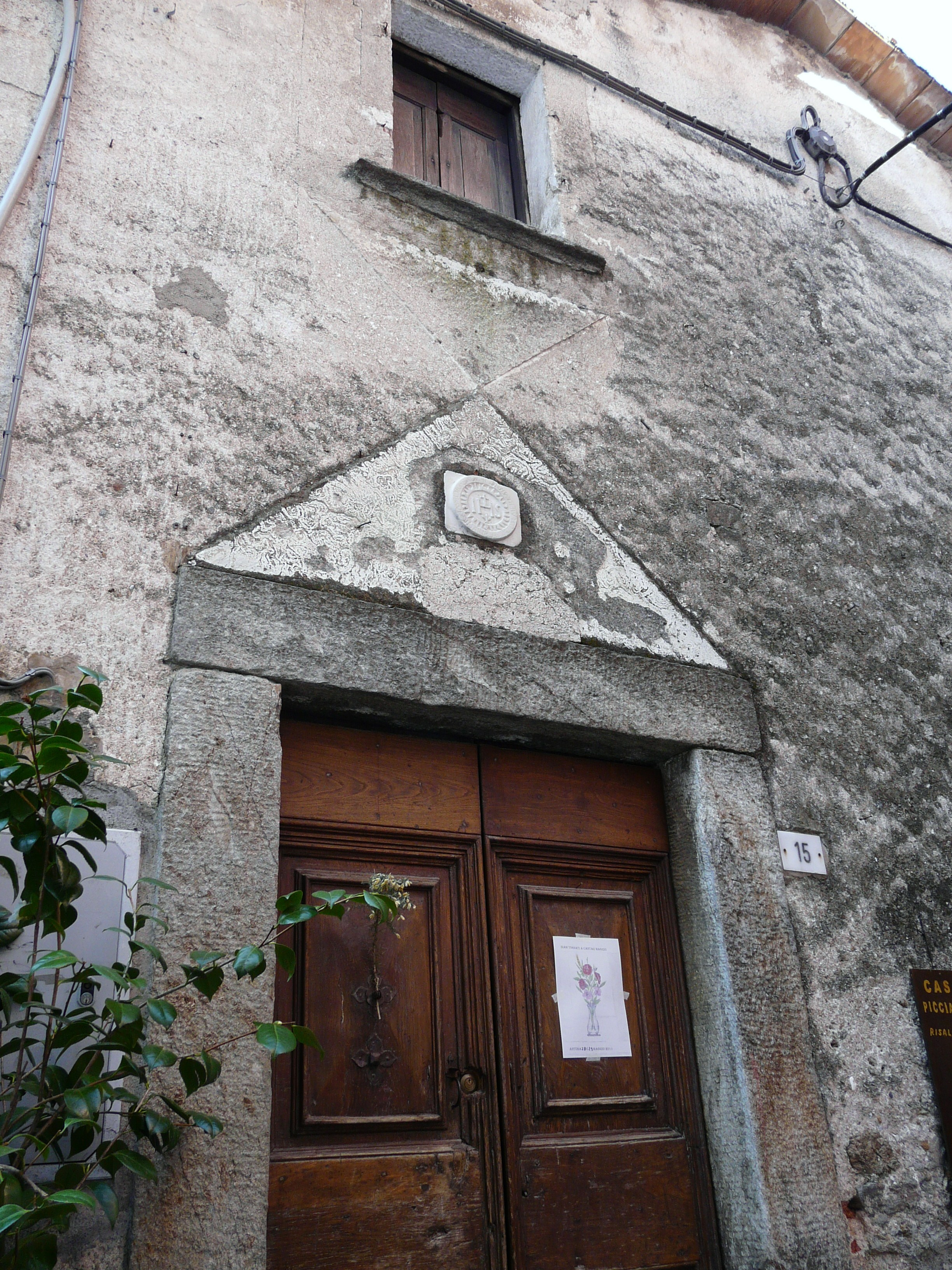 Casa Piccianti, Antona, Massa, Toscana, Italia